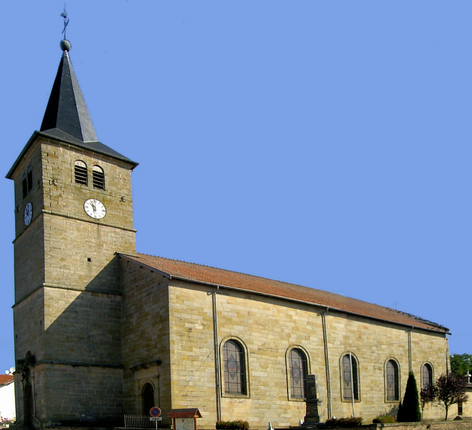 L'èglise Saint-Évre d'Uriménil